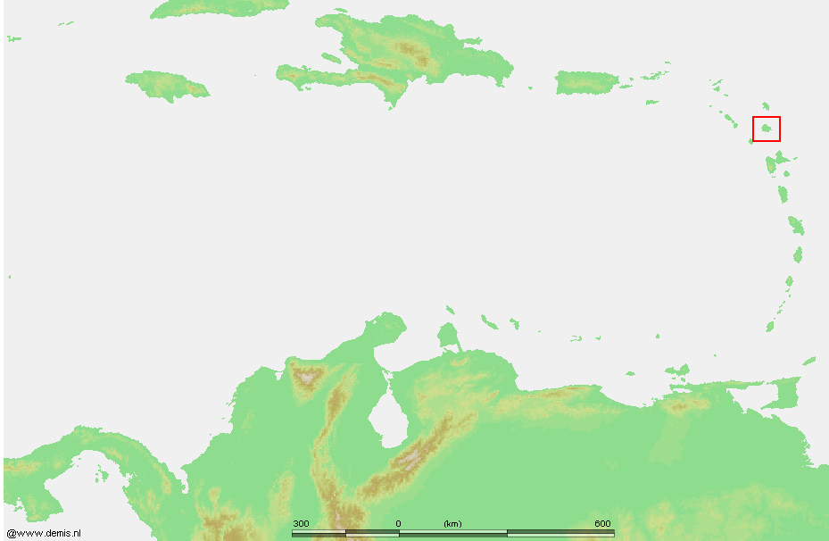 Caribbean - Antigua.PNG